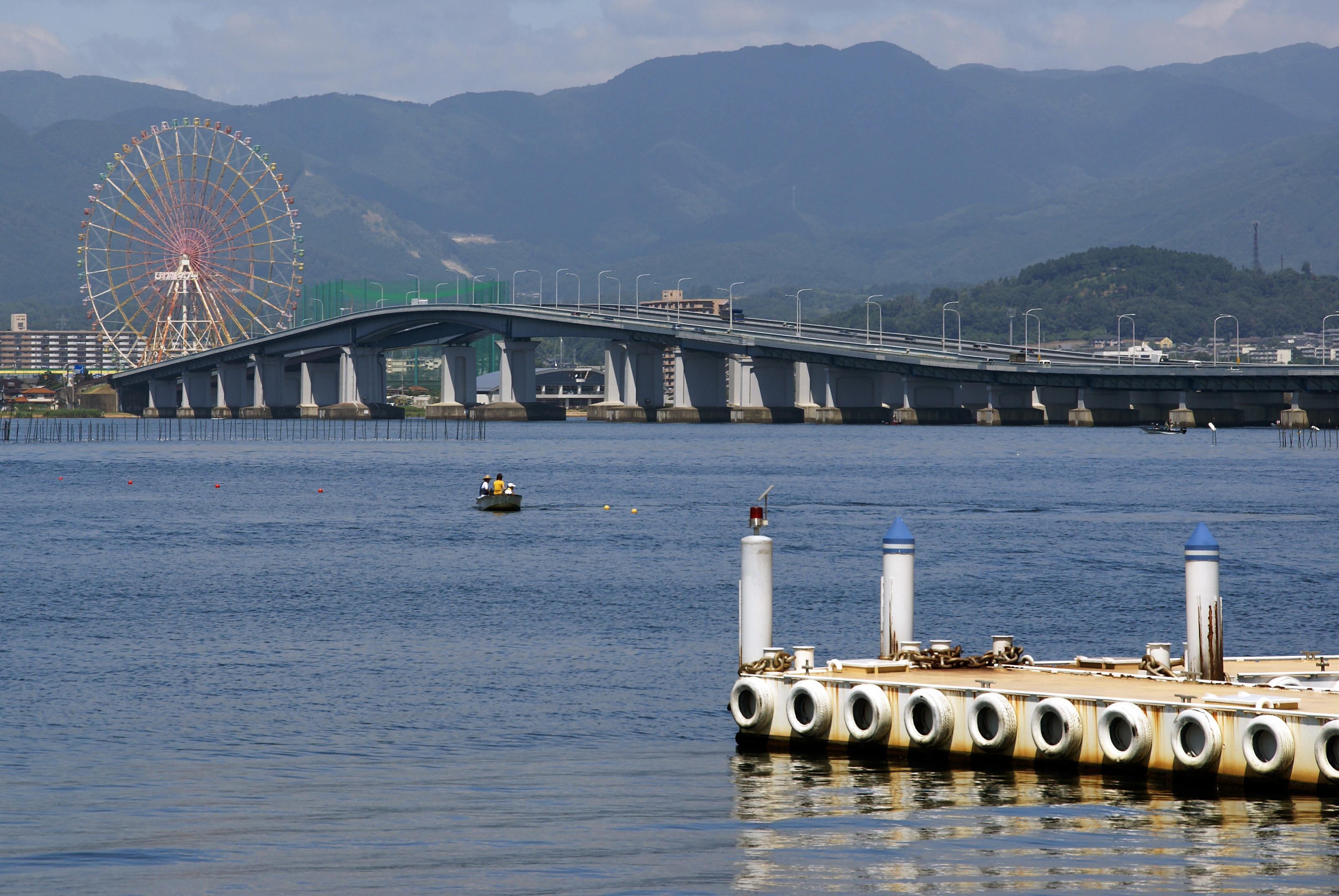 Lake Biwa Bridge (The Biwako-ohashi) in Moriyama, Shiga prefecture, Japan